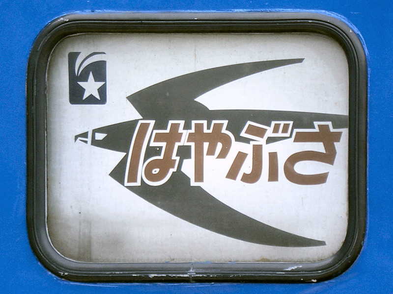 Limited Express Tailmark "Hayabusa", Kyushu raiway company. 寝台特急はやぶさ テールマーク 撮影者/著者/著作権保有者 : MK Products 撮影日 : 2008/11/03